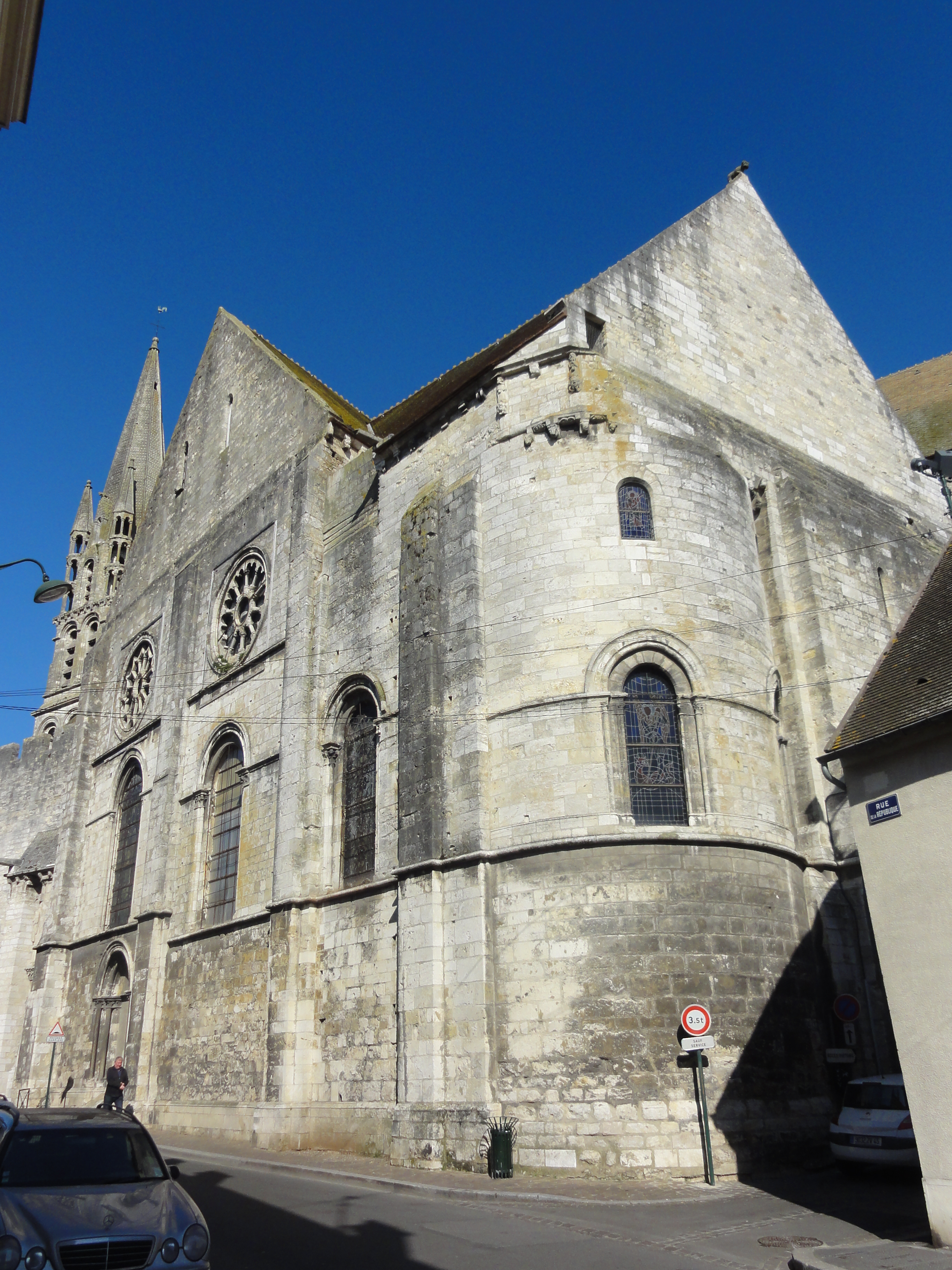 Vue depuis le sud-est.